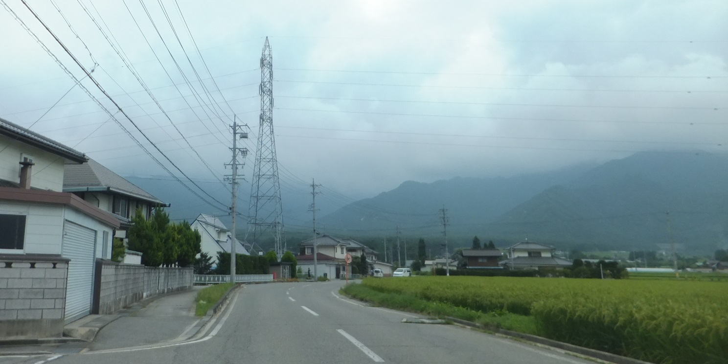 長野県北安曇郡松川村